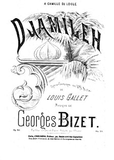 Афиша премьеры оперы "Джамиле" Жоржа Бизе 22 мая 1872 года.